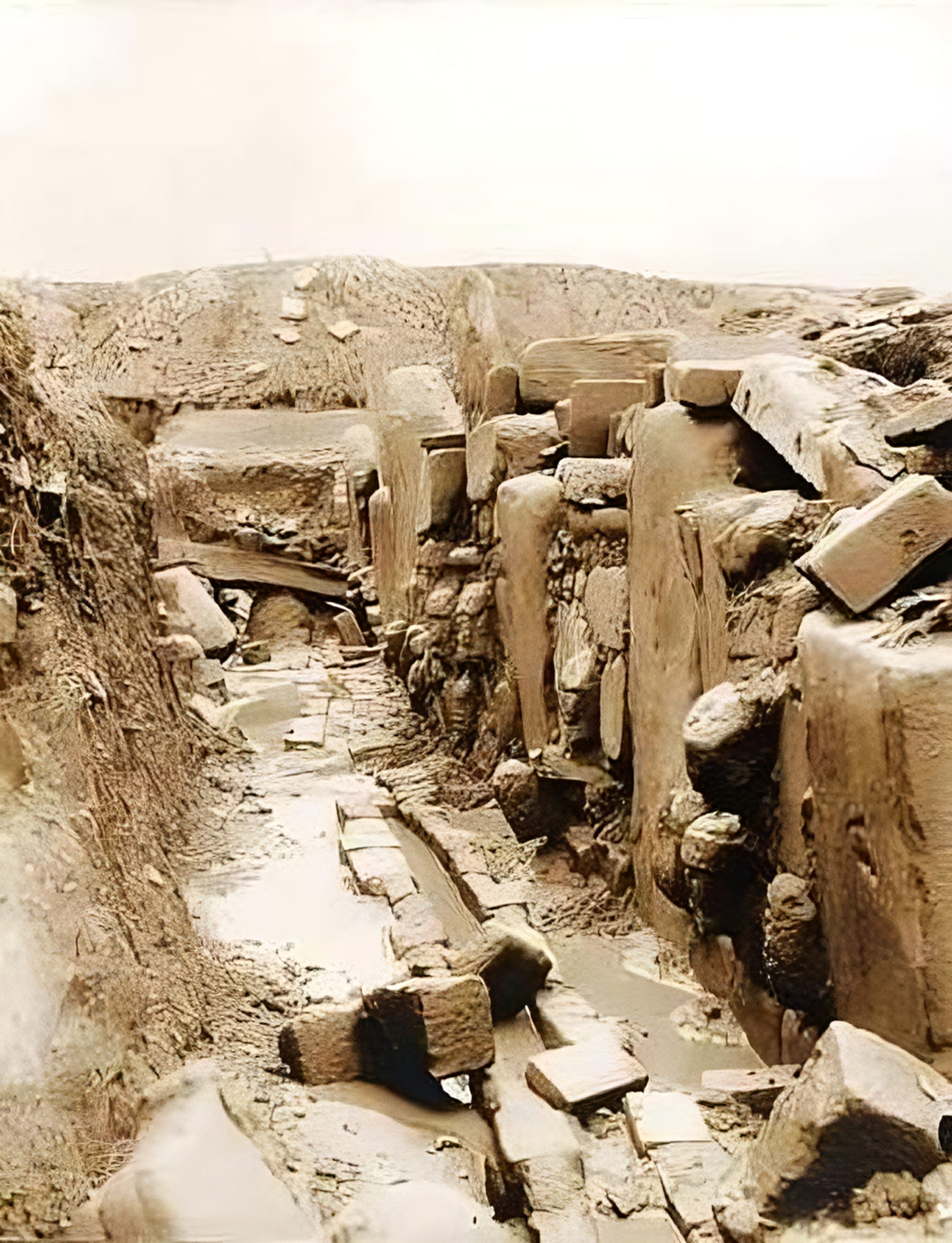 Tihuanacu, primeras excavaciones